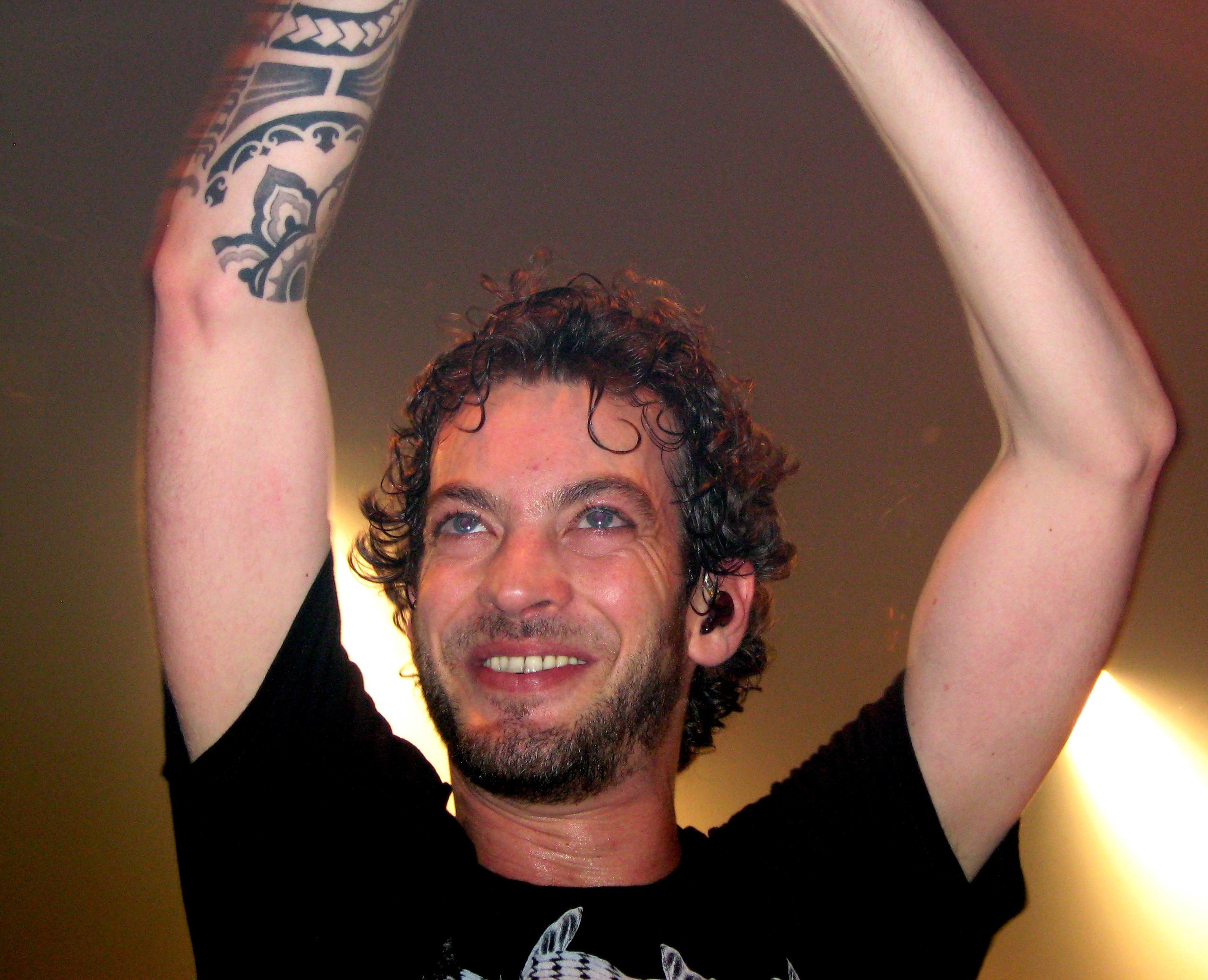 מוקי, צולם במהלך הופעה של שב"ק ס' במועדון הבארוק בבאר שבע